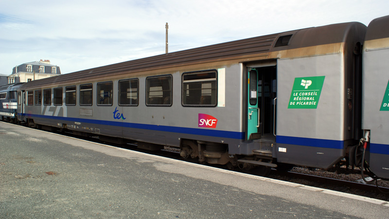 Voiture B11tu du TER Picardie (50 87 21-77 515-5)